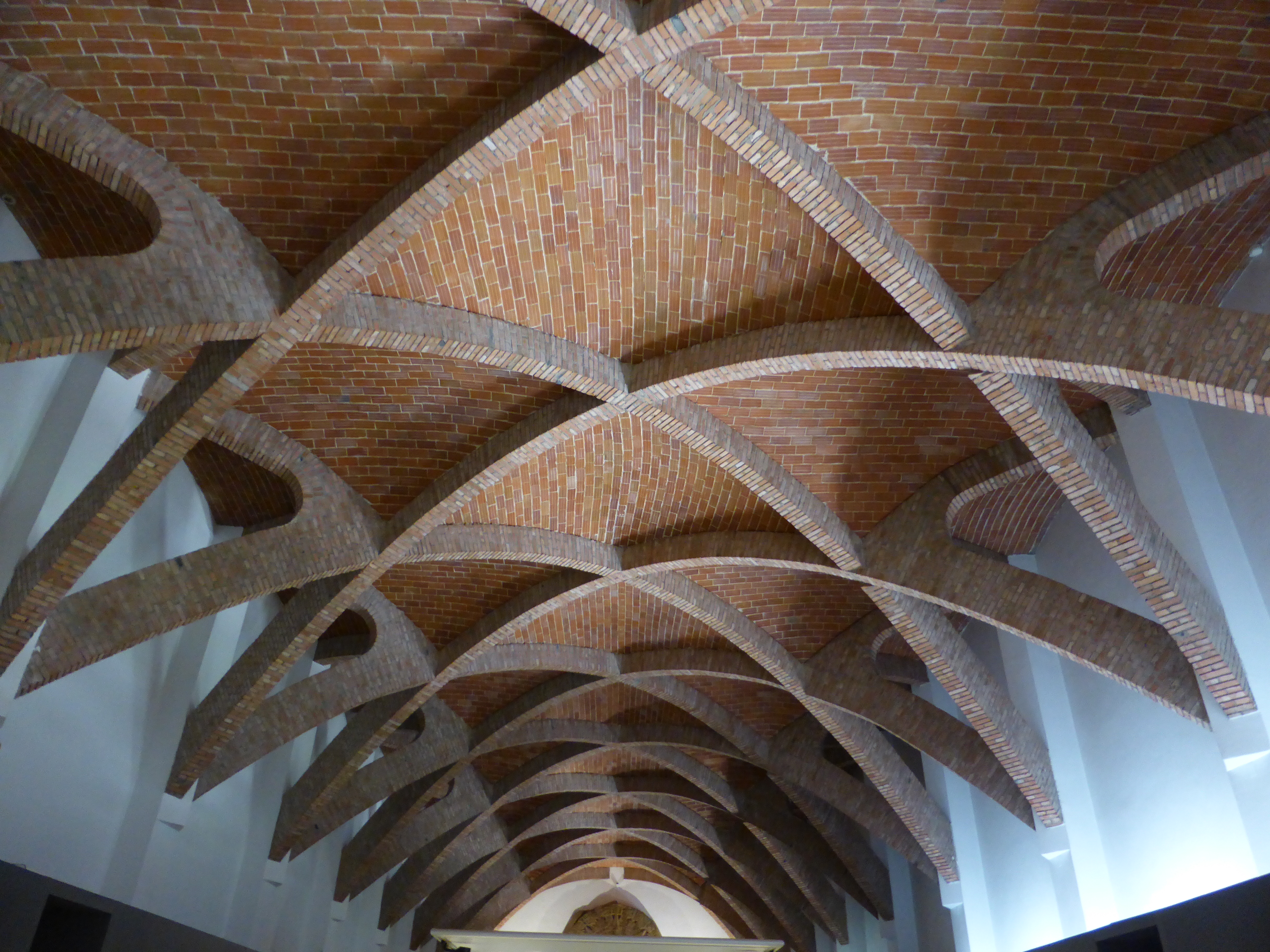 En la primera planta, primera sala titulada "El conocimiento de América", del Museo de América, la techumbre está formada por una bóveda tabicada de ladrillo, con nervaduras.